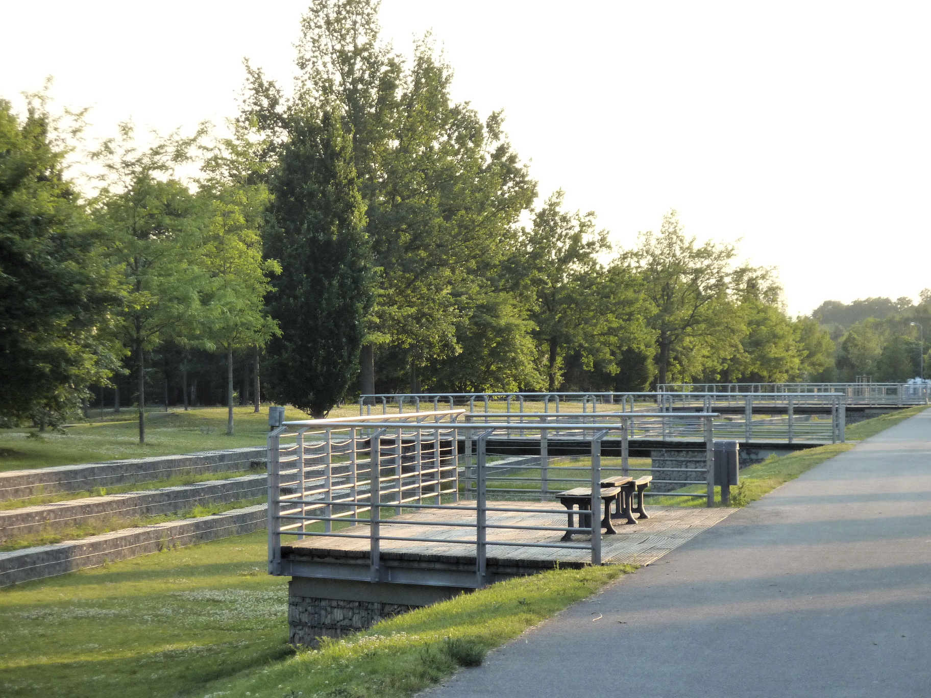 Frankfurt am Main, Stadtteil Bockenheim, Rebstockviertel: Der Neue Rebstockpark ist eine im Jahr 2005 eröffnete öffentliche Grünanlage, gestaltet im Stil moderner Landschaftsarchitektur. Das Foto zeigt eine „Bastion“ genannte Plattform am nördlichen Rand eines 400 Meter langen, „Rasengracht“ genannten Grabens im Park